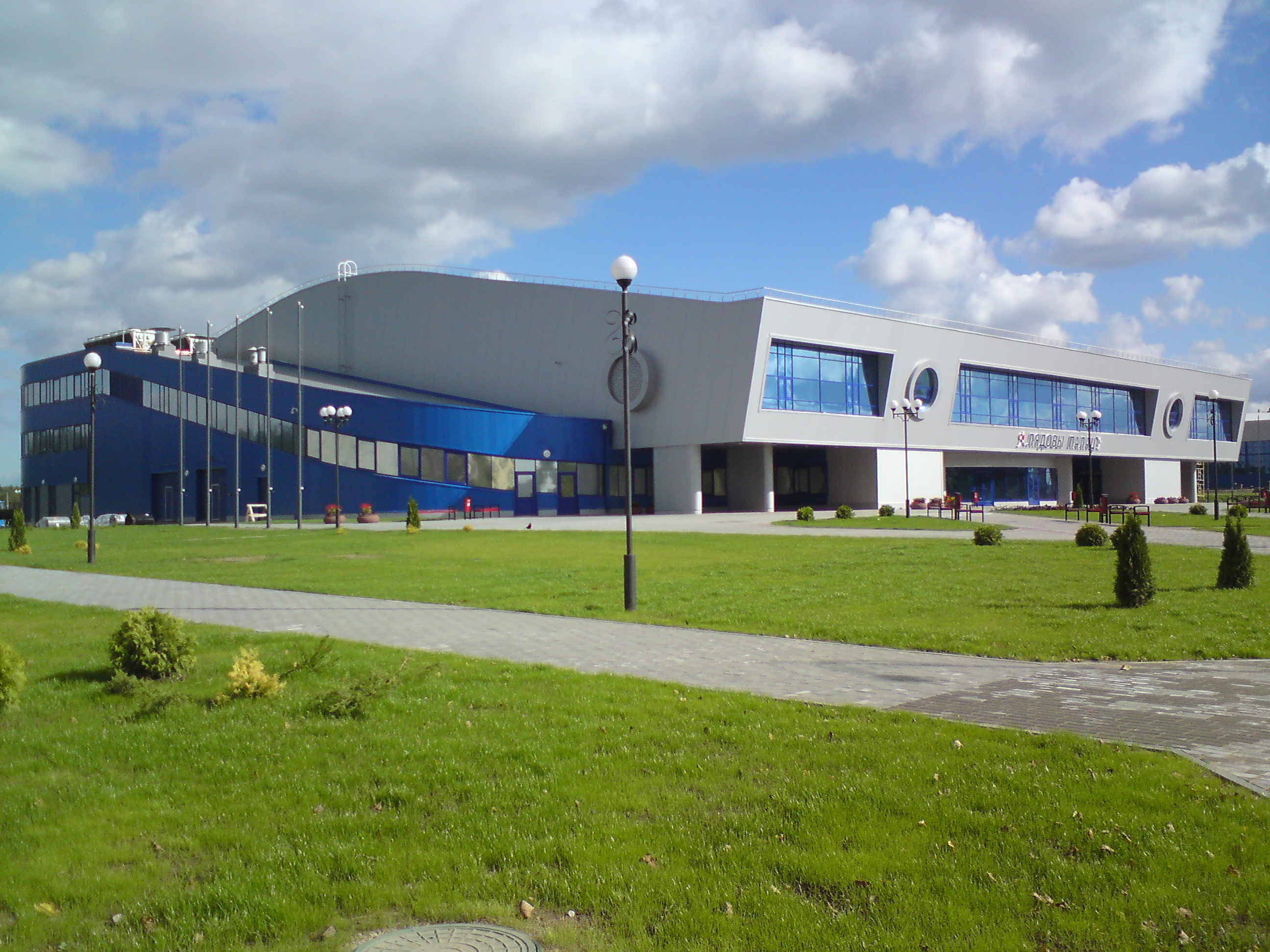 Ледовый замок. Город Лида